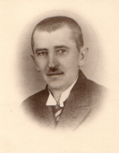 Profesorul Arcadie Dugan-Opaiţ